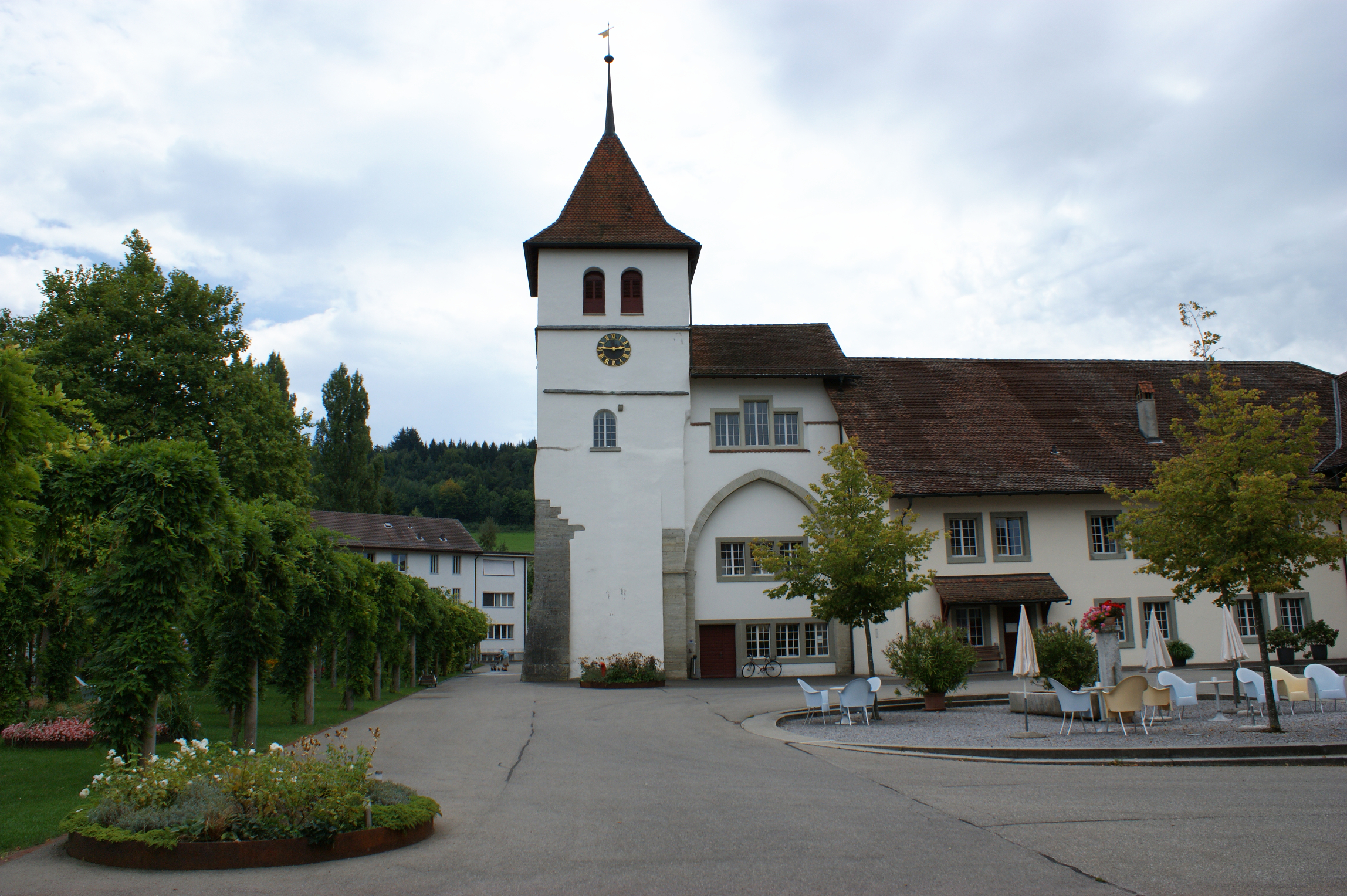 Begegnungsplatz Wohn- und Pflegeheim Frienisberg mit Turm des ehemaligen Klosters